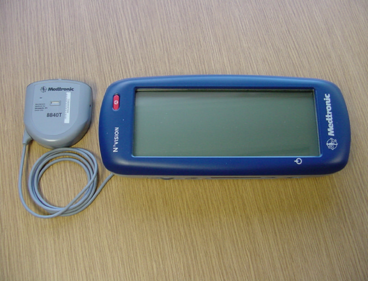 Programmiergerät mit Touchscreen und Telemetrie-Kopf zur Verbindung mit dem implantierten Neuromodulator